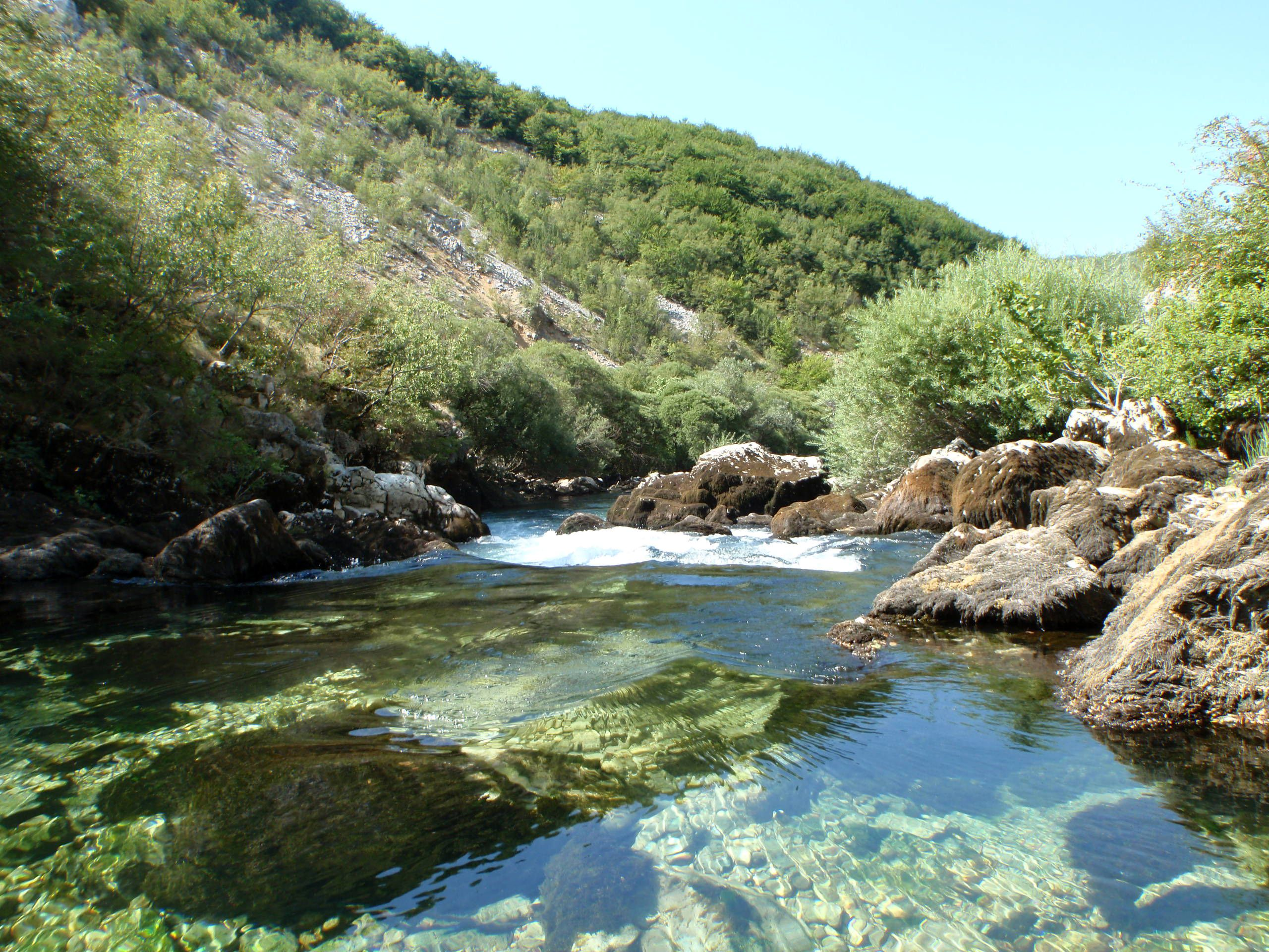 Fluss Unac kurz vor der Vereinigung mit der Una